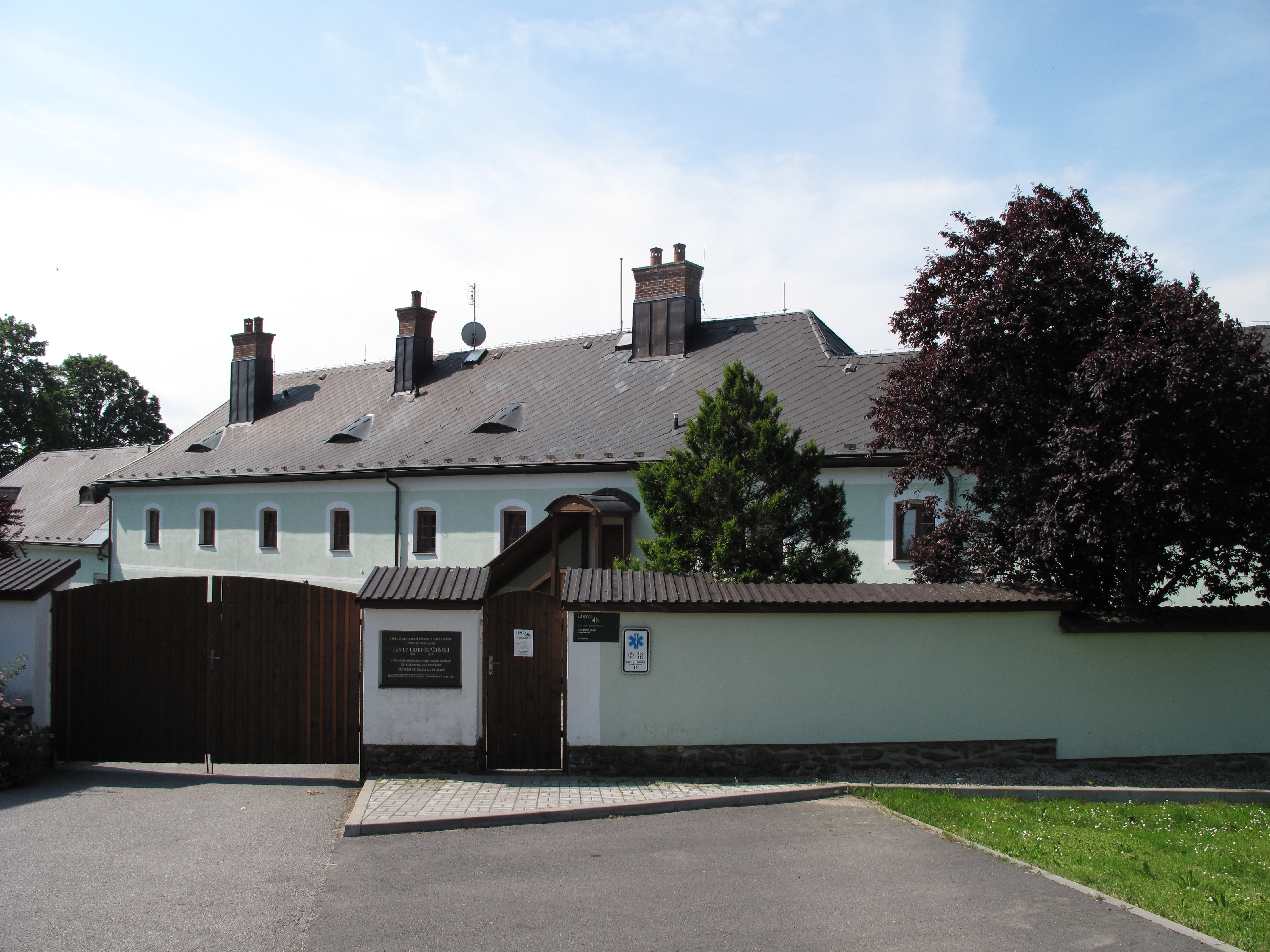 Ľesovna v Zátoni. Okres Prachatice, Česká republika.